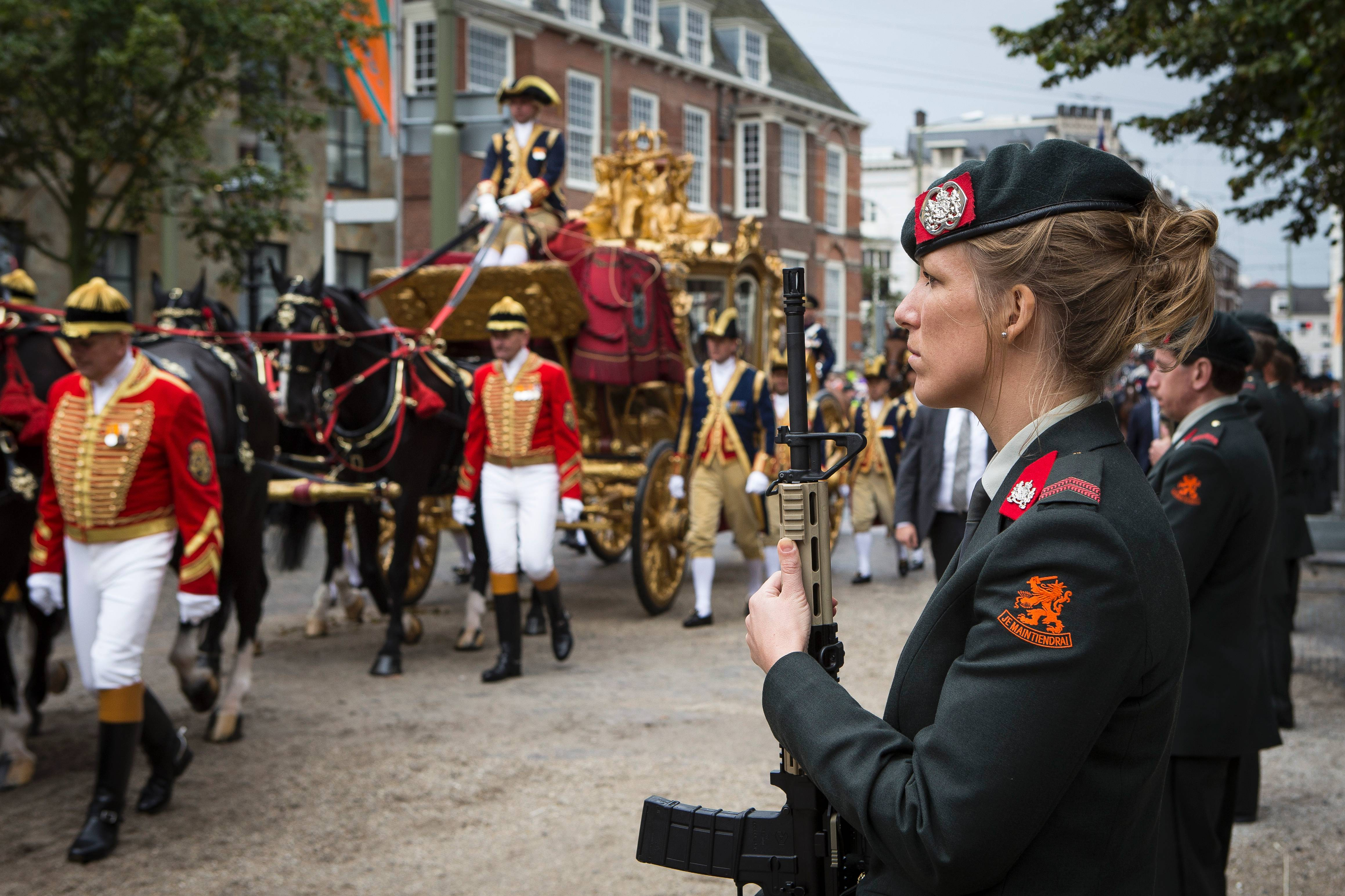 Erewacht Prinsjesdag 2015 In het gelid Elk krijgsmachtsonderdeel levert de nodigde manschappen voor Prinsjesdag. Zo levert de Koninklijke Marine meer dan 100 militairen voor de erewacht bij de Ridderzaal en de militaire muziek. De landmacht levert ruim 230 medewerkers voor de Koninklijke stoet, ook hier zitten muzikanten tussen. Voor de ere-afzetting langs de route worden meer dan 400 militairen geleverd.